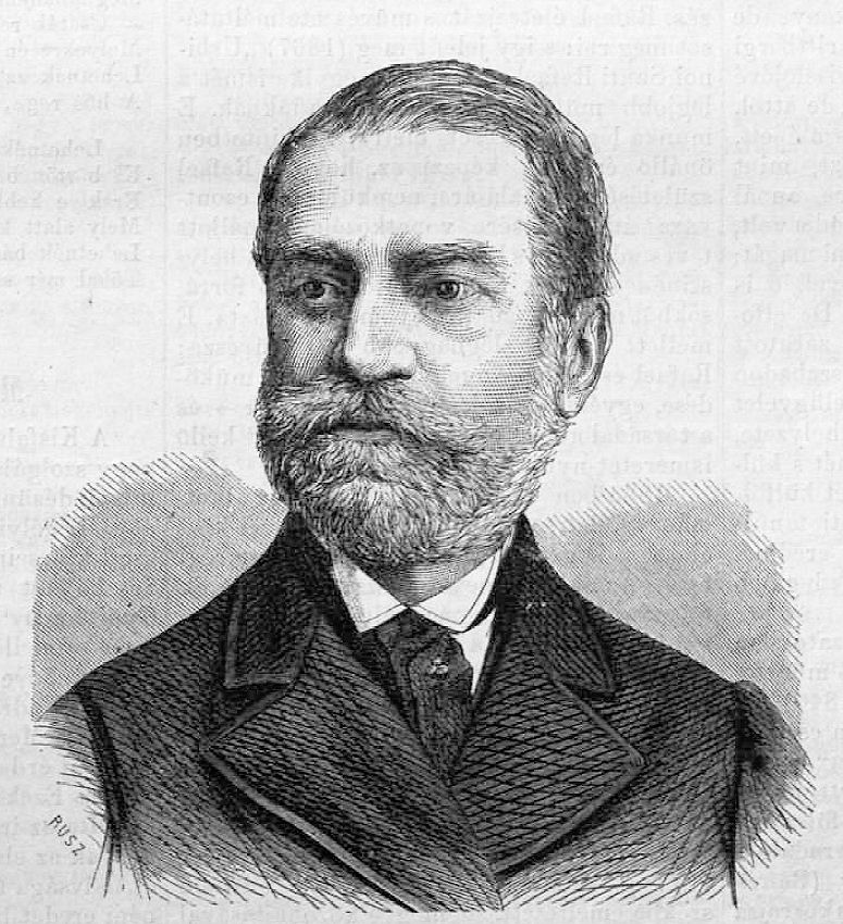 Ormós Zsigmond (1813–1894) politikus, művészettörténész portréja. Rusz Károly metszete